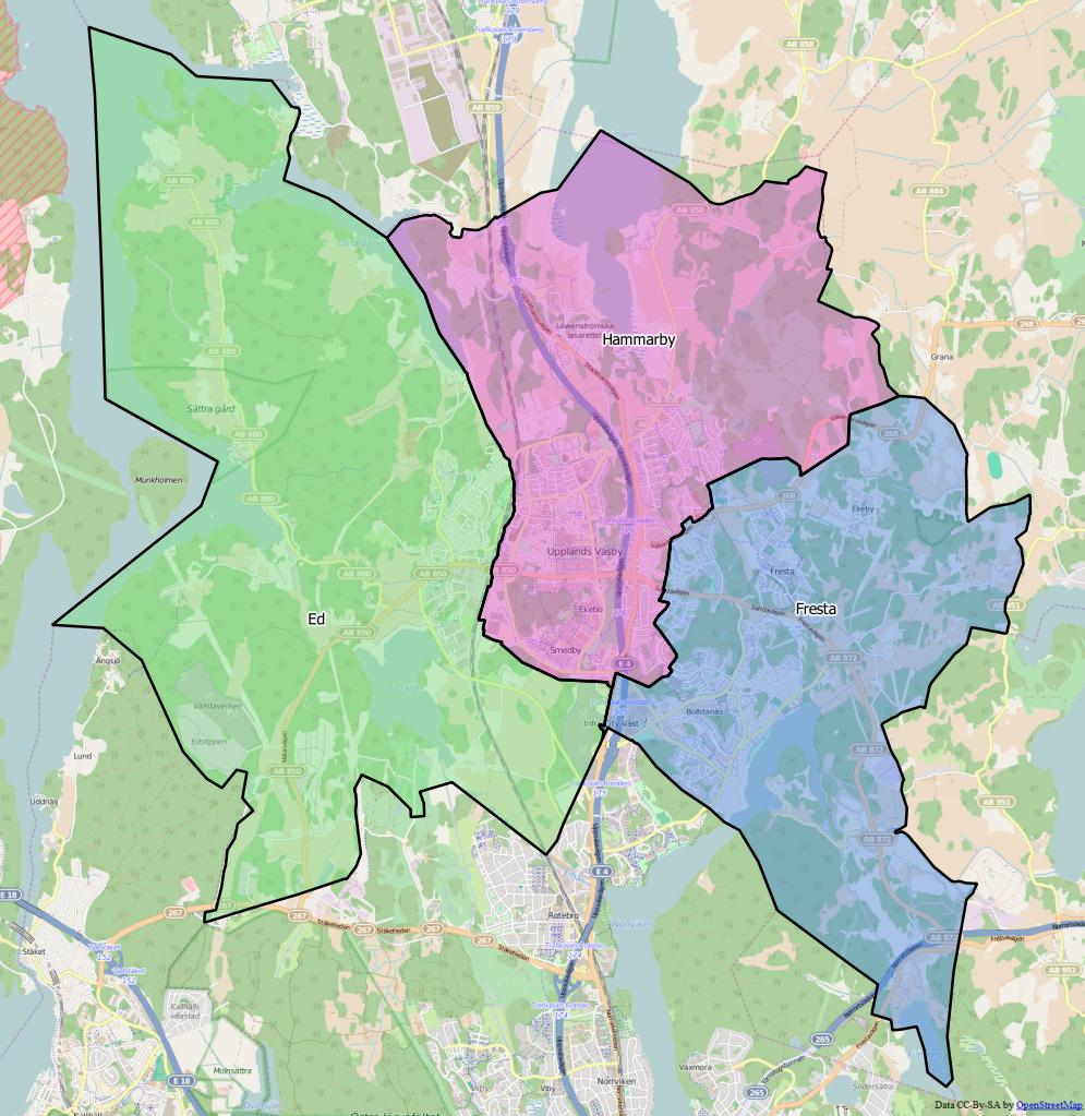 Distriktsindelningen i Upplands Väsby kommun World file: 26.71468650036558046 0 0 -26.71468650036558046 1980136.50371560361236334 8306489.7627960192039609